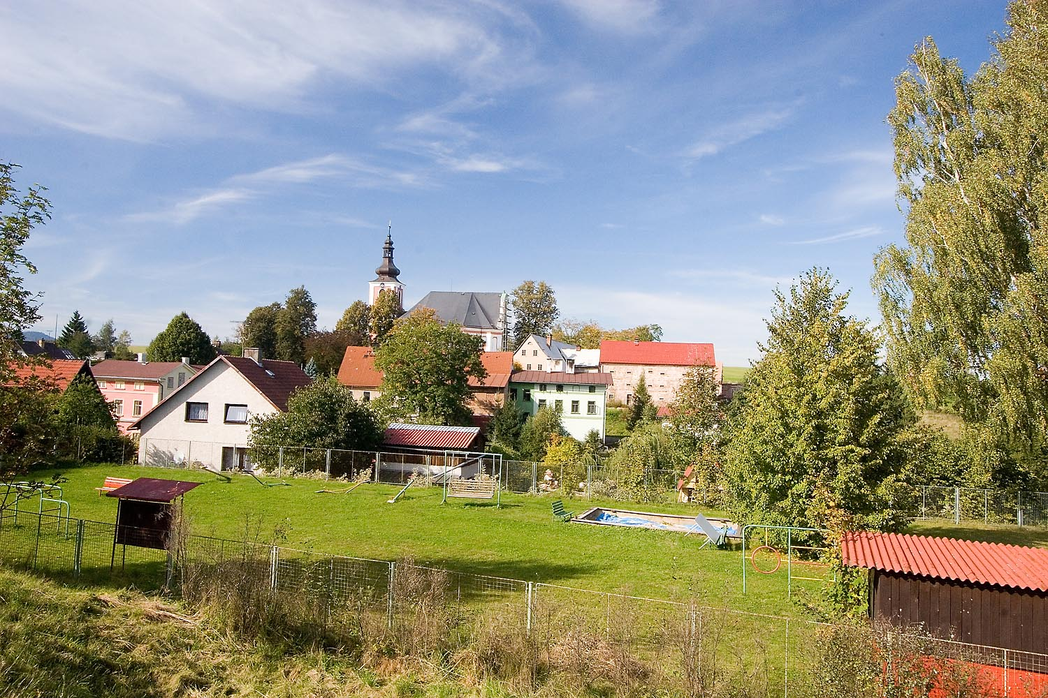 Pohled na Božanov